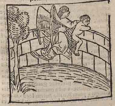 Ausschnitt aus der Visio Tnugdali, gedruckt bei Johann und Konrad Hist in Speyer (1483): Tundalus und sein Schutzengel schauen über eine der Mauern, die die Himmelsregionen gliedern.